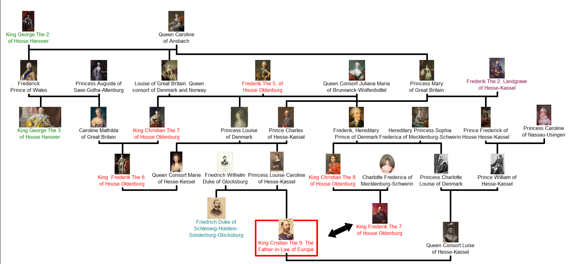 Christian IX of Denmark's genealogical connection to Frederick VII